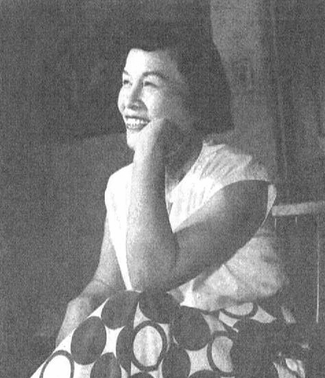 読売新聞社『家庭よみうり』351号（1953年）より岸輝子